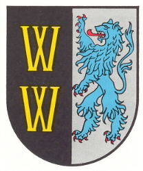 Wappen von Welchweiler